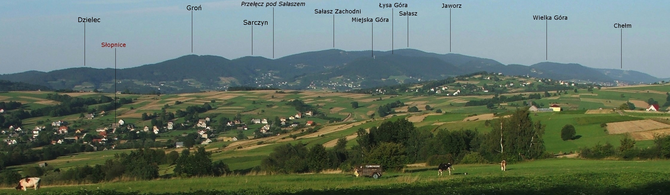 Pasmo Łososińskie, widok ze Słopnic